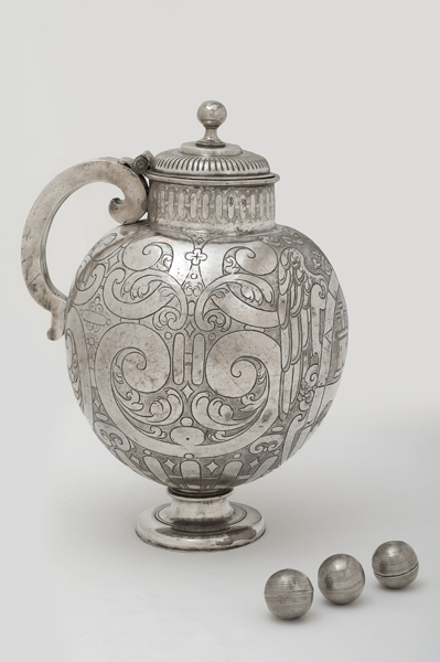 Urna de la Mesta (Barroco). Número de inventario: 2002-57-1.